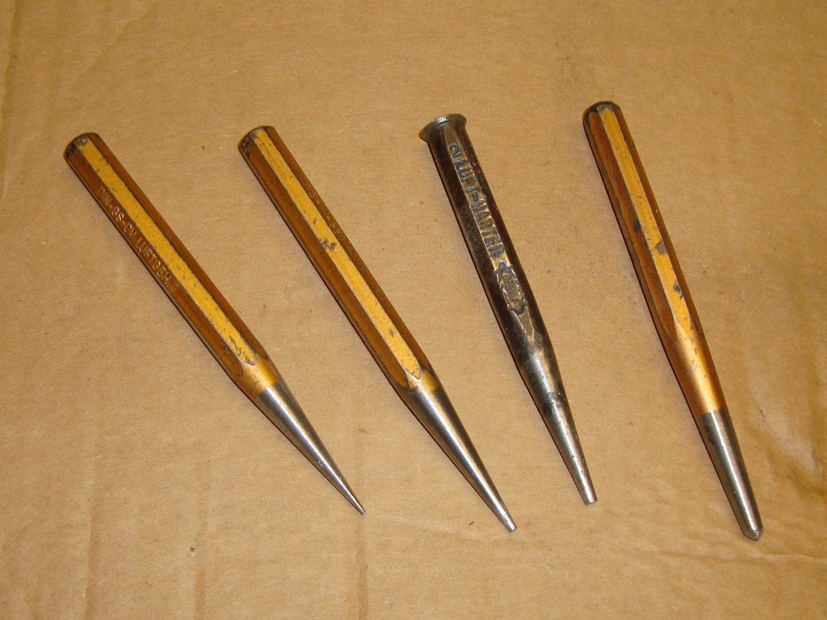 Versenker für Nägel in verschiedener Größe und ein Körner (rechts)